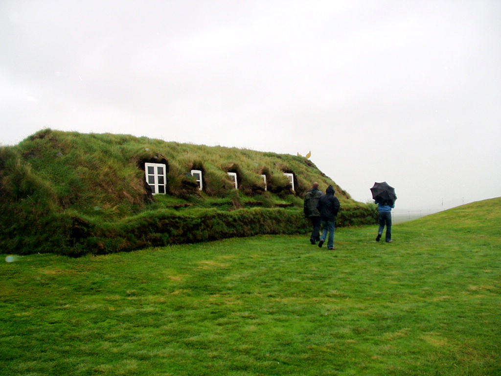 Hembygdsmuseet i Glaumbær, Island, augusti 2005.